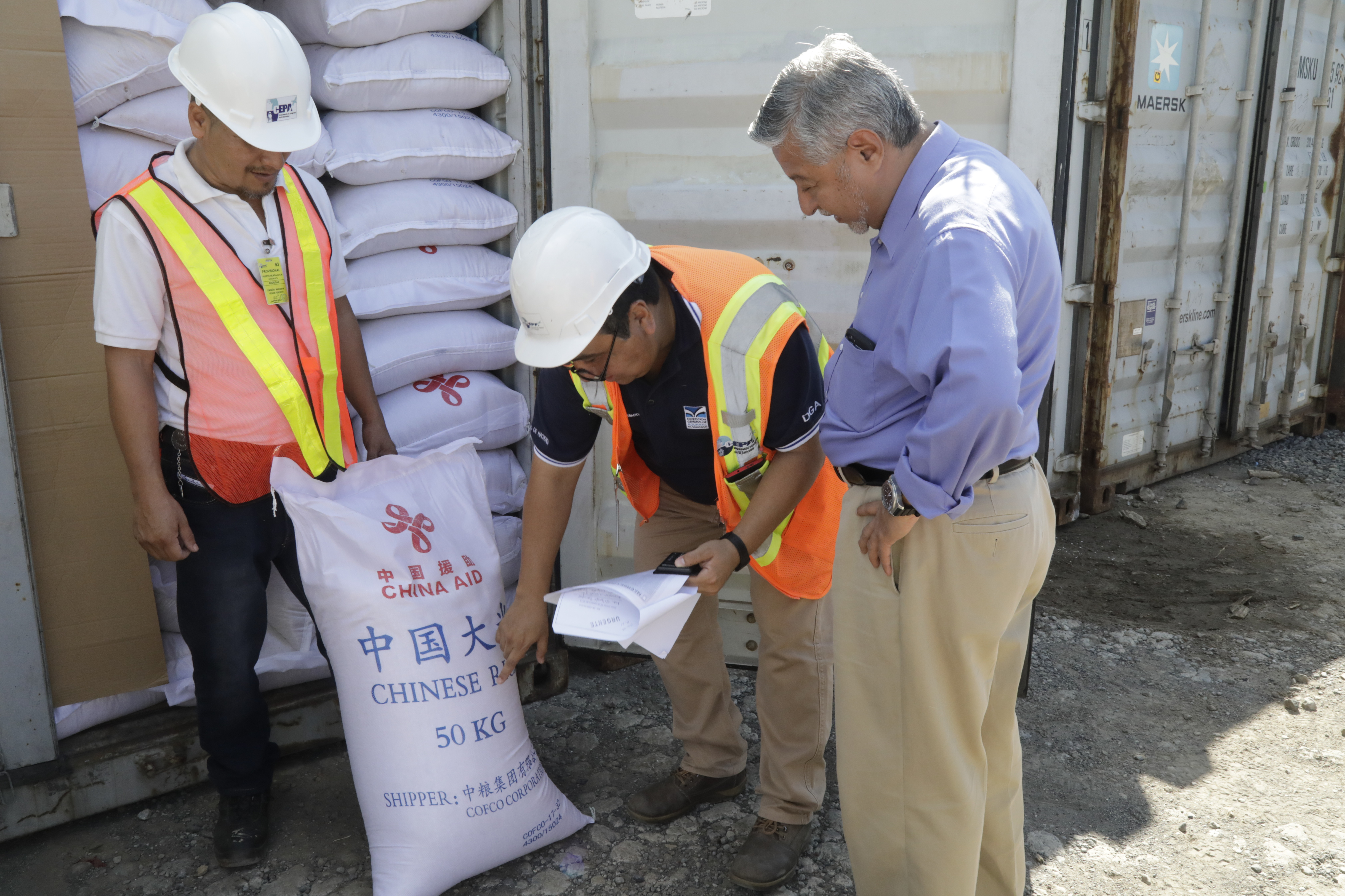 El Gobierno de El Salvador recibió las primeras mil toneladas métricas de arroz donado por la República Popular China para contribuir a la seguridad alimentaria